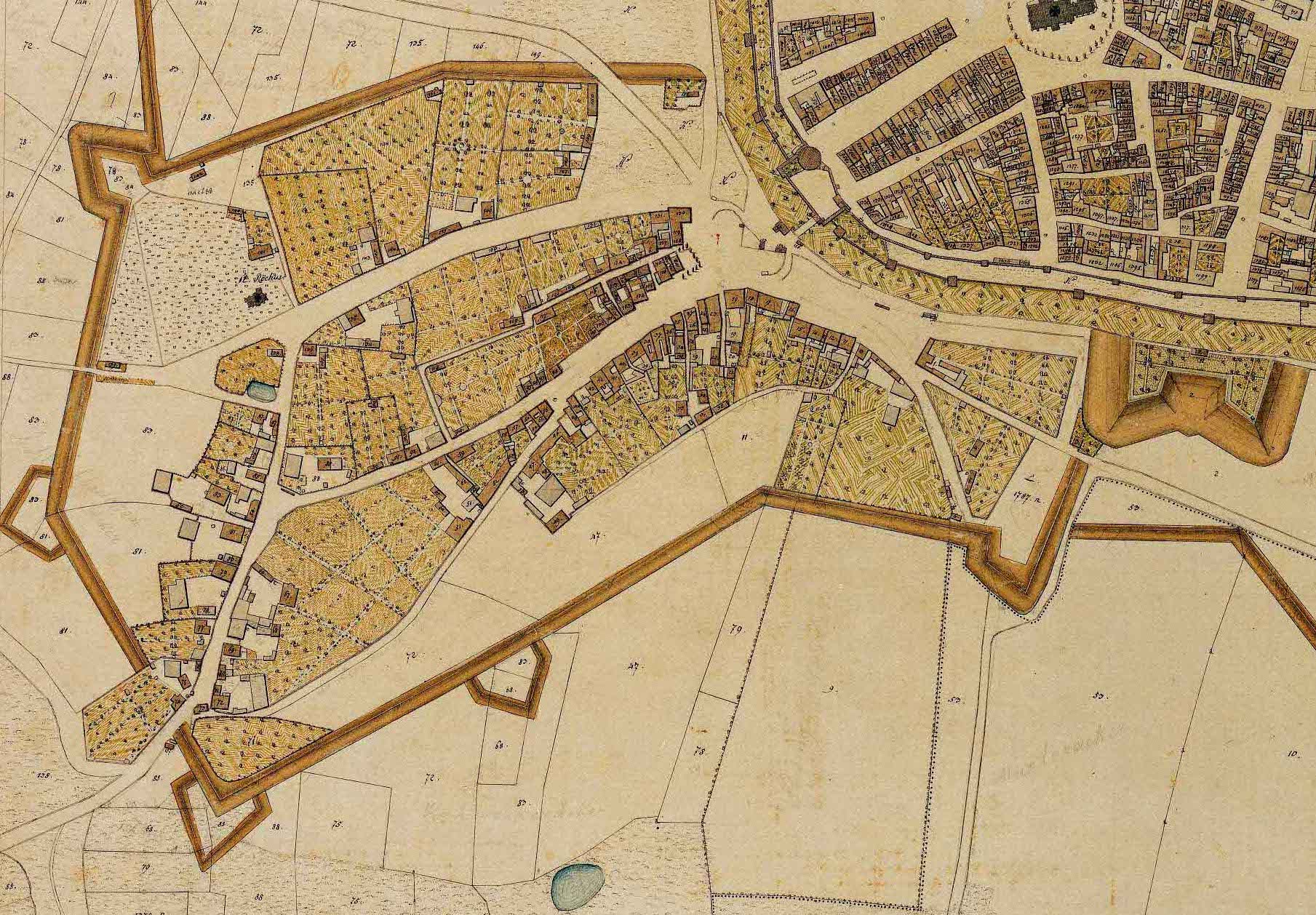 Nürnberg, Gostenhof. Ausschnitt aus einem Plan der Steuer-Kataster-Kommission (später Katasterbureau) des Königreichs Bayern